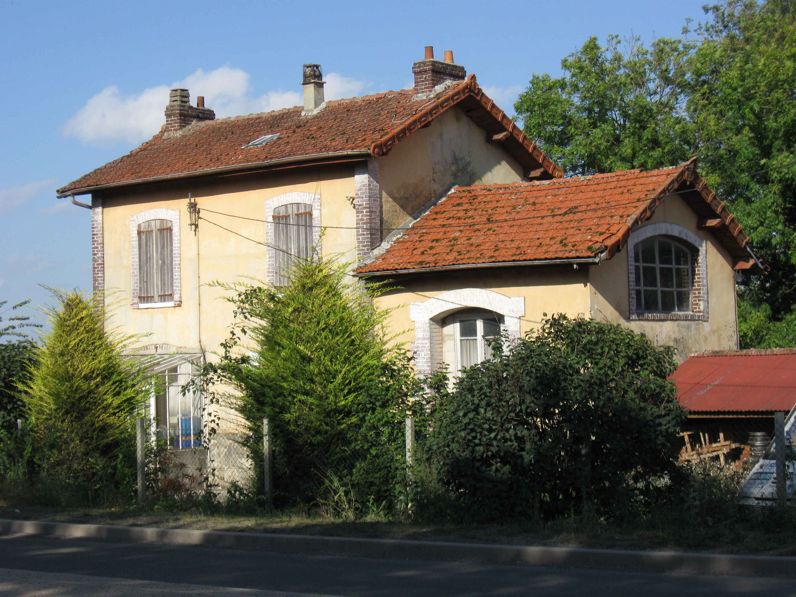 Ancienne gare de Monthyon du tramway de Meaux à Dammartin. (Seine-et-Marne, région Île-de-France).